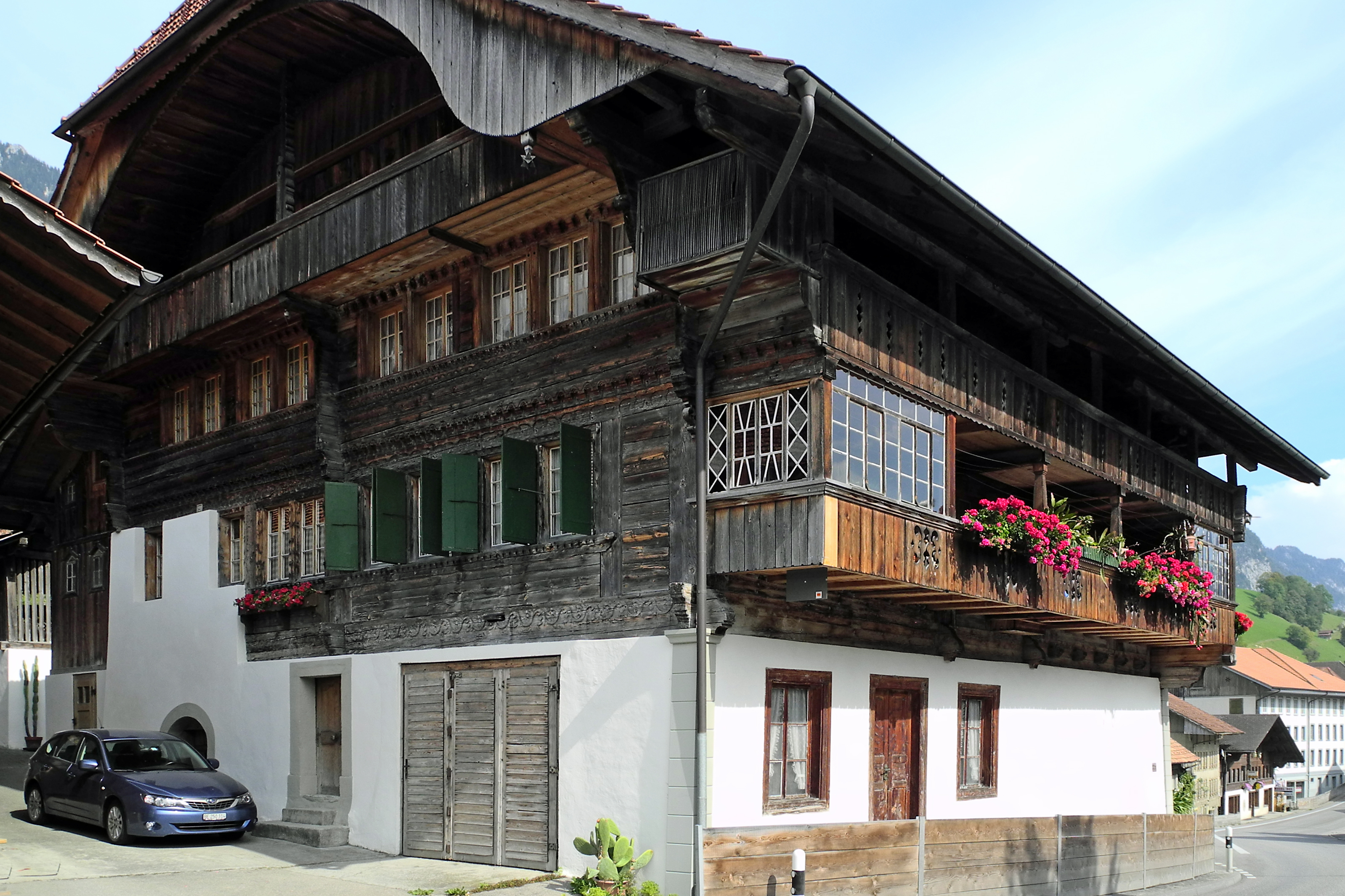 Erlenbach im Simmental, Platzhaus